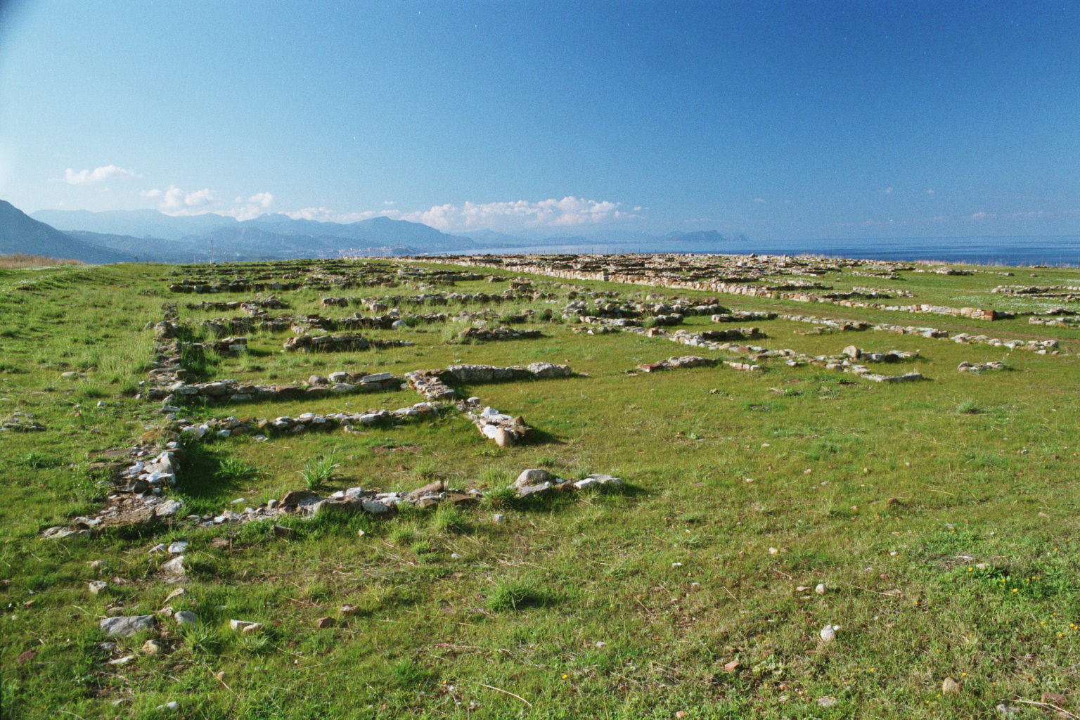 Himera